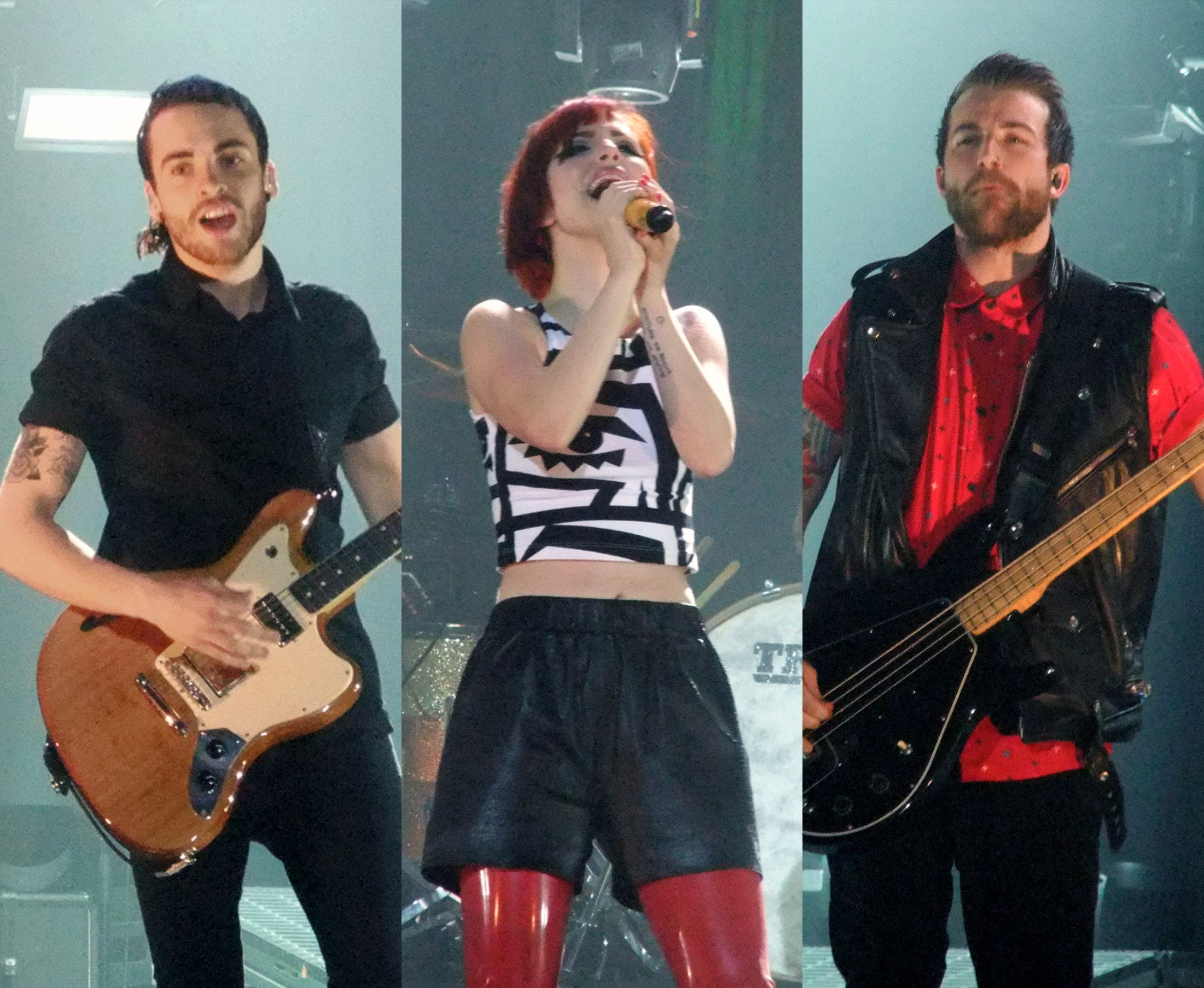 Actual alineación de Paramore, en un concierto en Ámsterdam el 5 de septiembre de 2013.